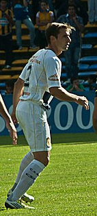 Partido del 18 de marzo de 2013, Rosario Central 2-Olimpo 2; Nahuel Valentini de Rosario Central.